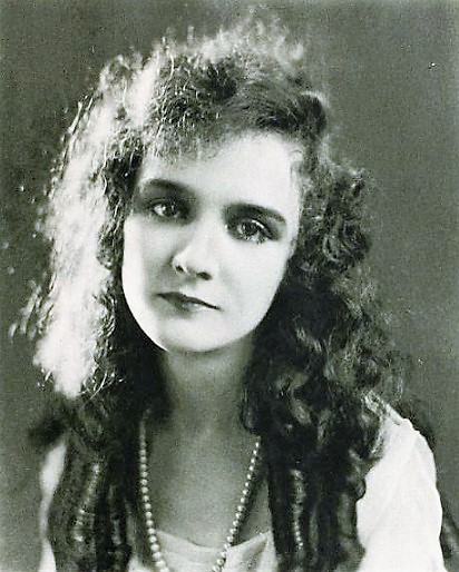 Mary Philbin